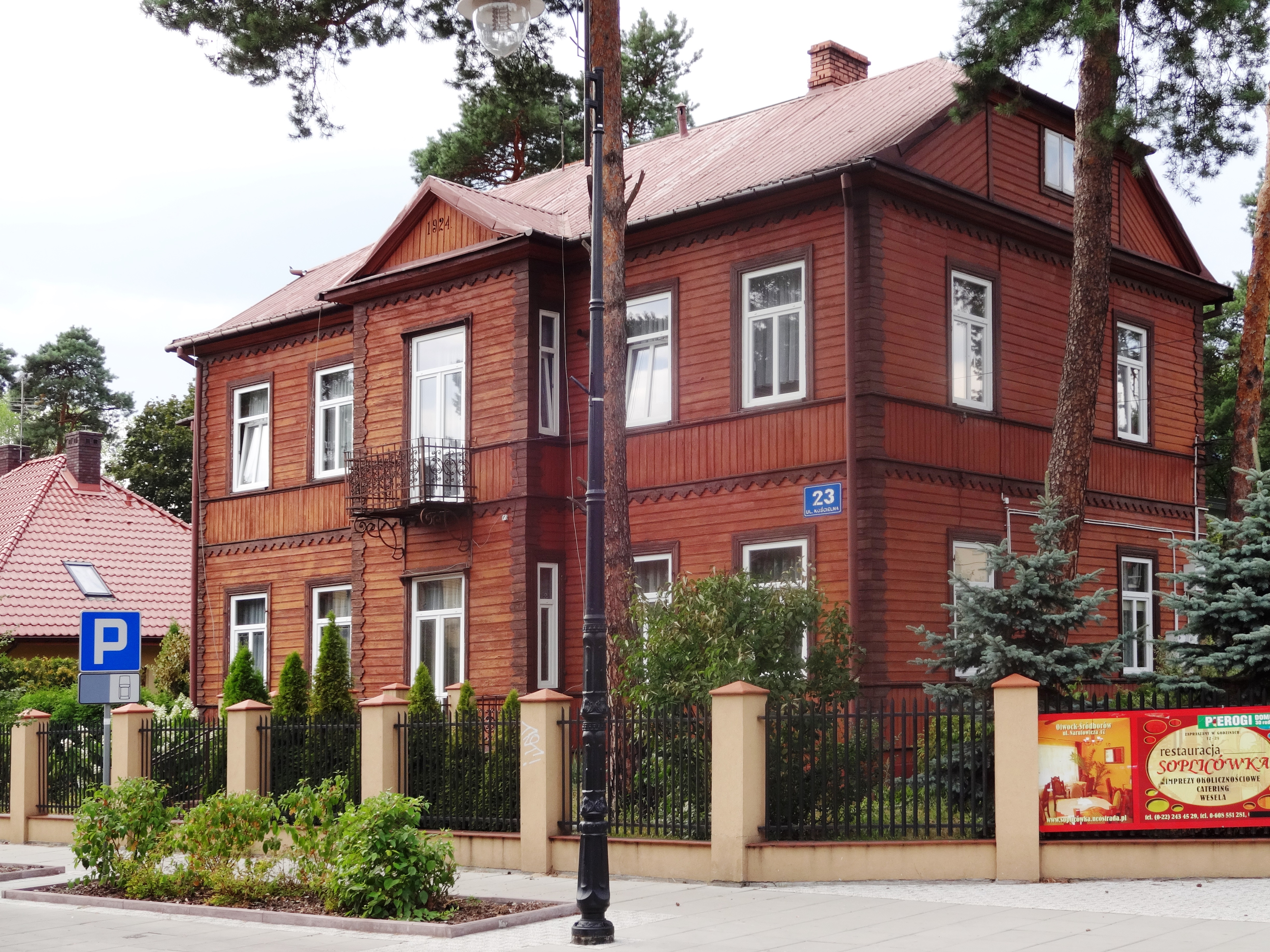 Pensjonat dr. Martyszewskiego (Kościelna 23). Zbudowany w 1924 r. przez J. Rechta. W 1925 r. mieścił się tu pensjonat dr. P. Martyszewskiego. Na parterze był gabinet przyjęć a na piętrze pensjonat dla chorych. Przed wojną na parterze urządzono cukiernię "Luksus". Przed wojną i kilkanaście lat po niej mieścił się tu też hotel "Liliana".